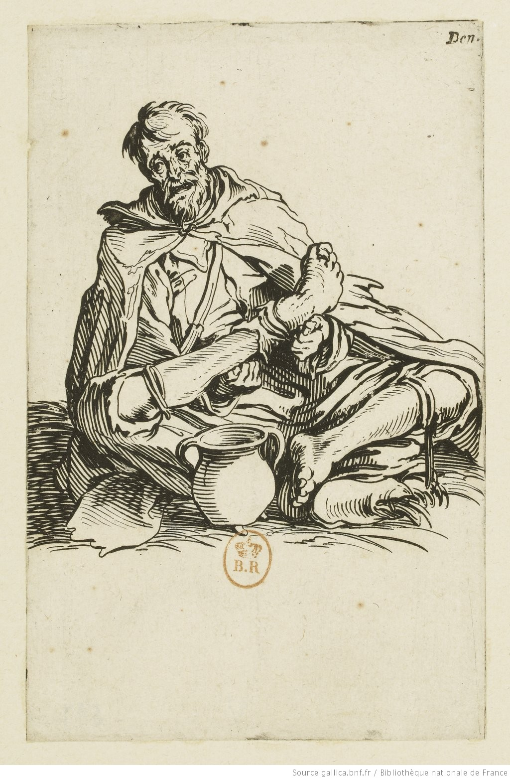 Eau-forte sur papier au filigrane du double C (1622-1623). Collection de la Bibliothèque nationale de France.